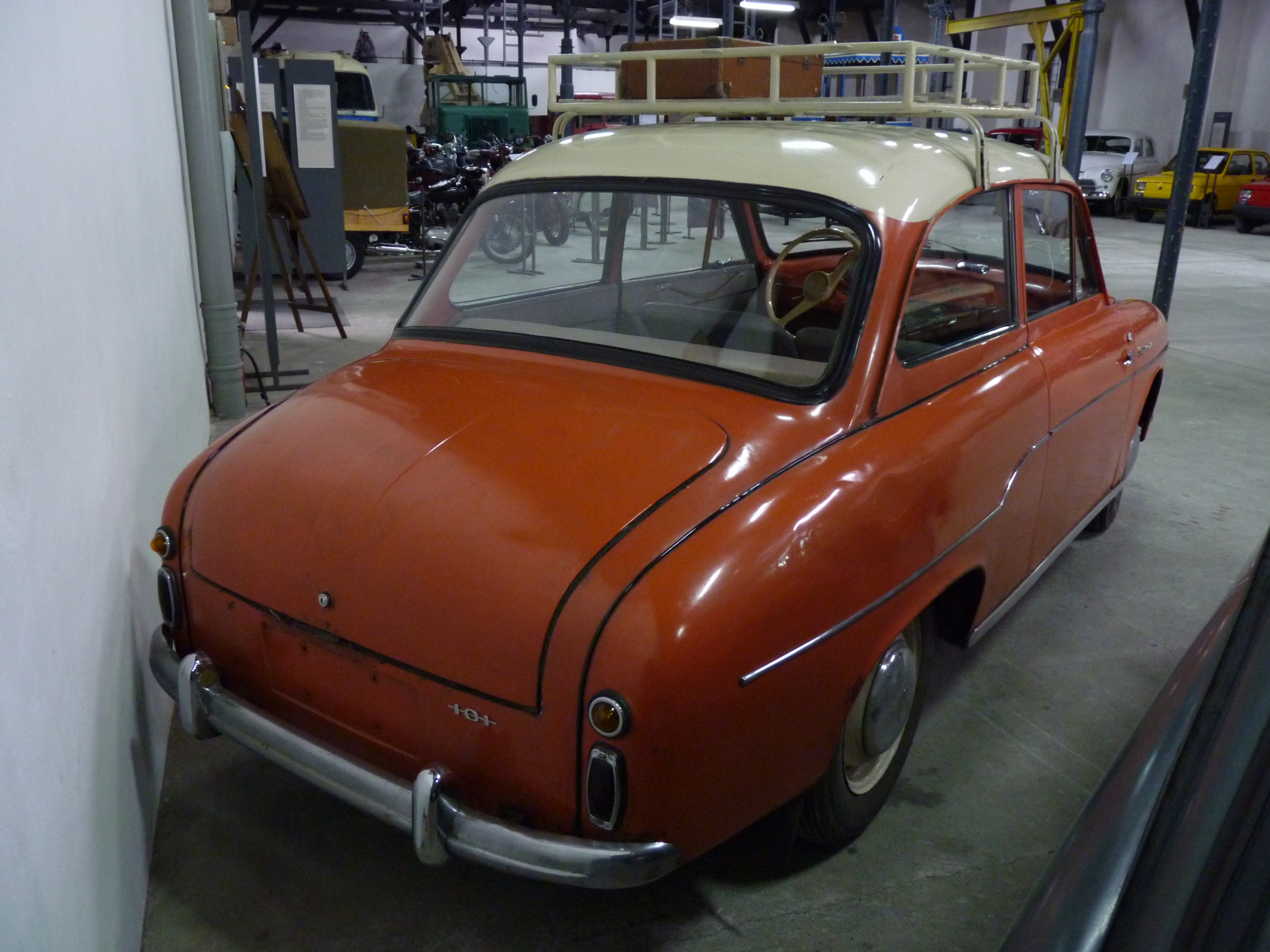 FSO Syrena 101 in Muzeum Inżynierii Miejskiej in Kraków.